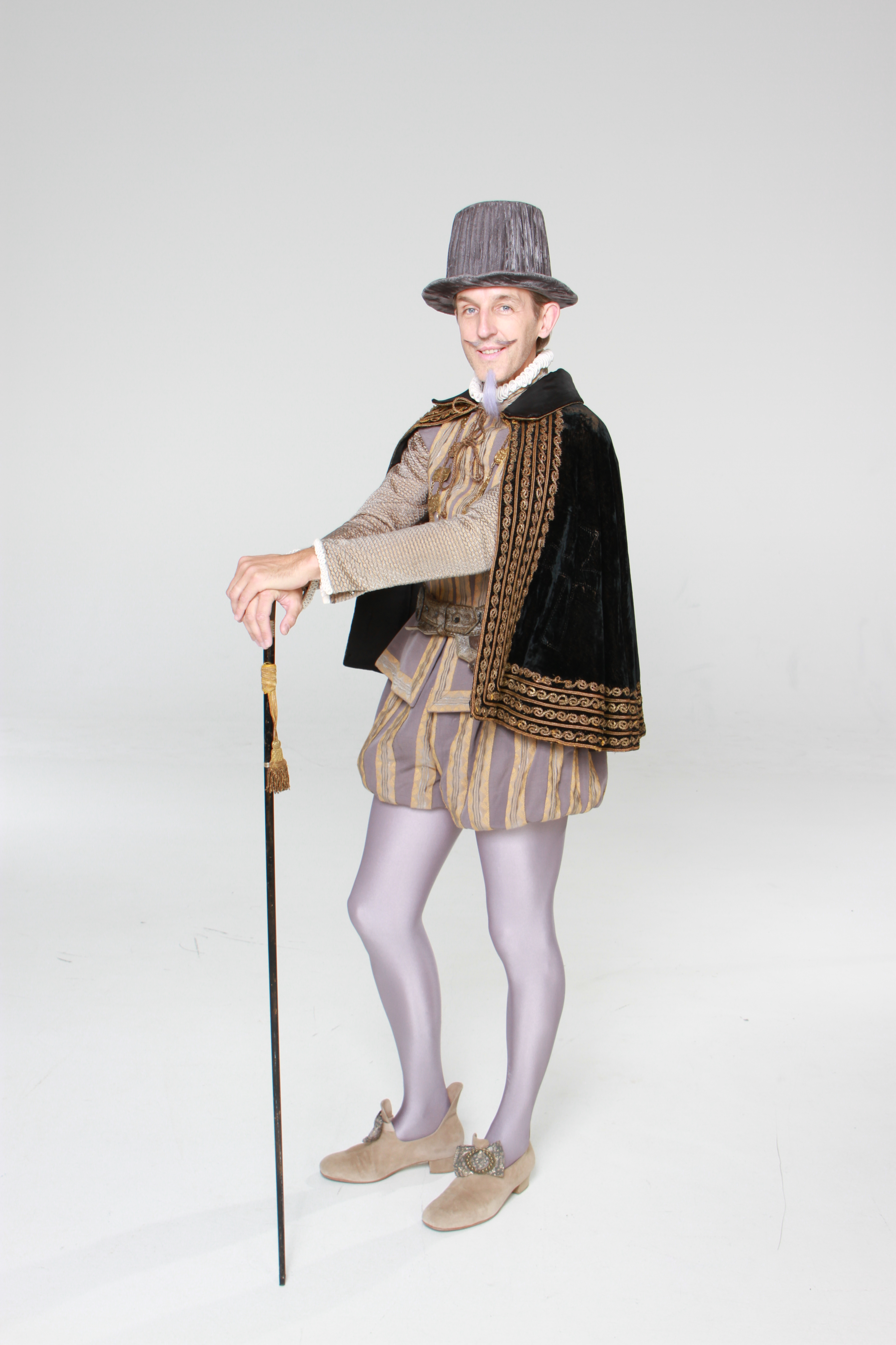 Andreas M. Schmidt (* 23. November 1963 in Heggen (Finnentrop)) ist ein deutscher Schauspieler, Regisseur und Rocksänger.